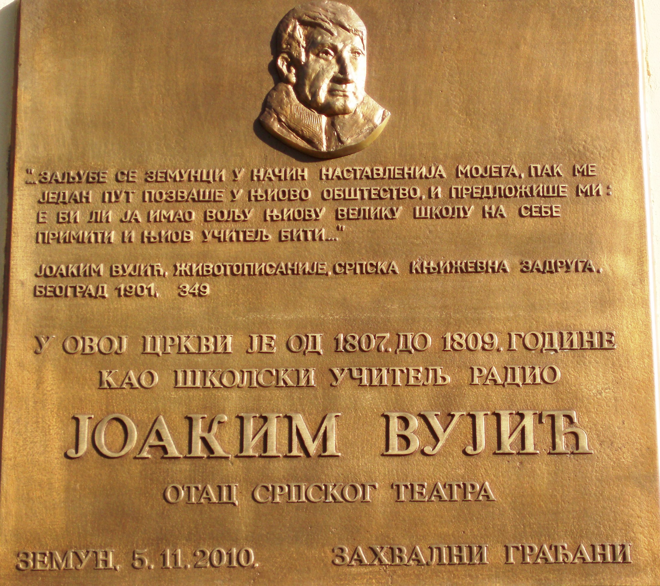 Фотографија спомен плоче на црквеном дому Николајевске цркве у Земуну, посвећена Јоакиму Вујићу, земунском учитељу. Аутор фотографије: Nicolo